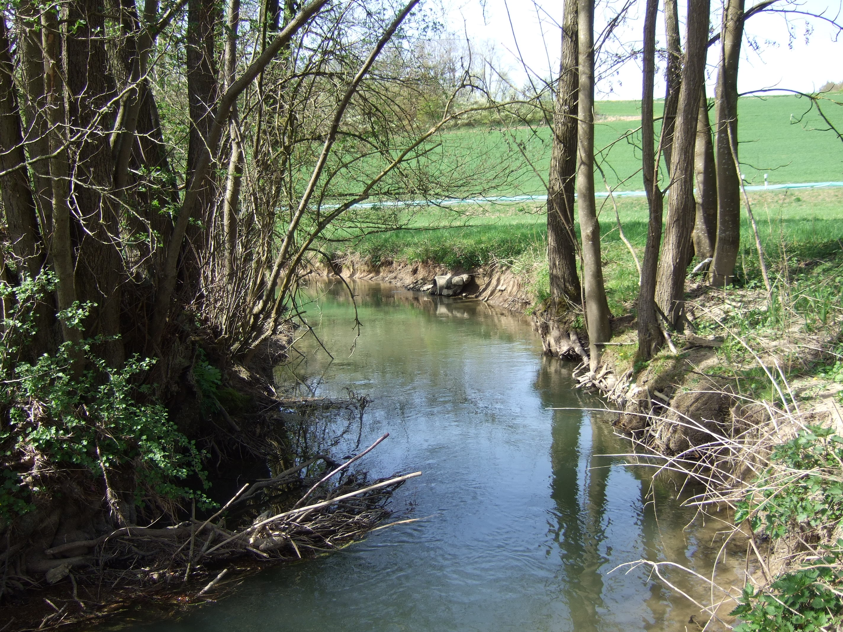 Der Aschbach am Kühlen Loch